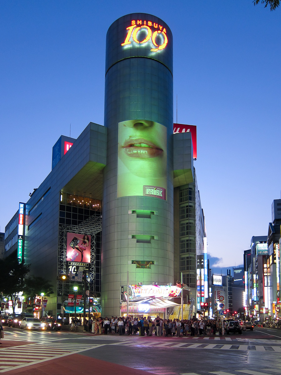 「Shibuya 109」夕景。